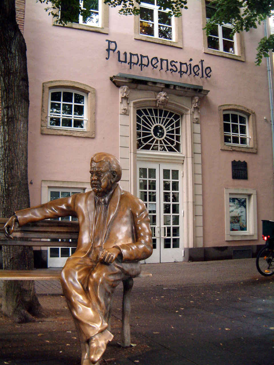 Willy-Millowitsch-Denkmal auf dem Eisenmarkt in Köln, gestiftet von Harry Owens Traumtheater Salome Hänneschen-Theater